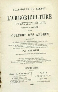 L'Arboriculture fruitière par Gressent, VIIe édition de 1882.